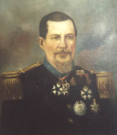 Obra da coleção Brasiliana Iconográfica.